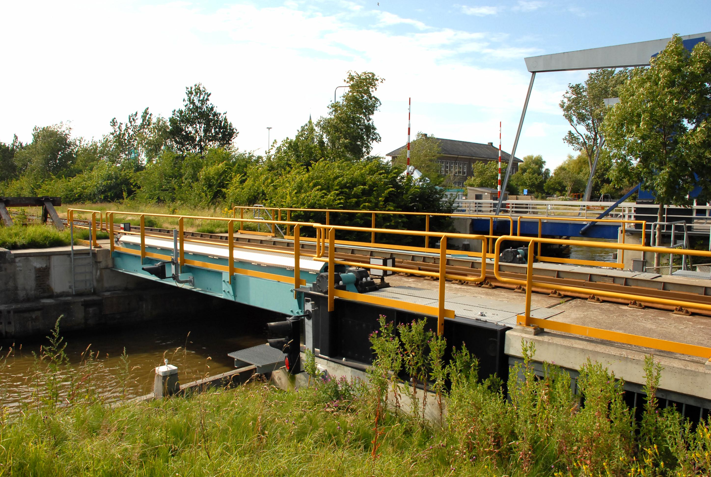 Spoorbrug op de voorgrond over de Zuidergracht/Bolswardervaart te Harlingen. Op de achtergrond is de baskule brug voor het wegverkeer. Hier lag vroeger de trambrug.